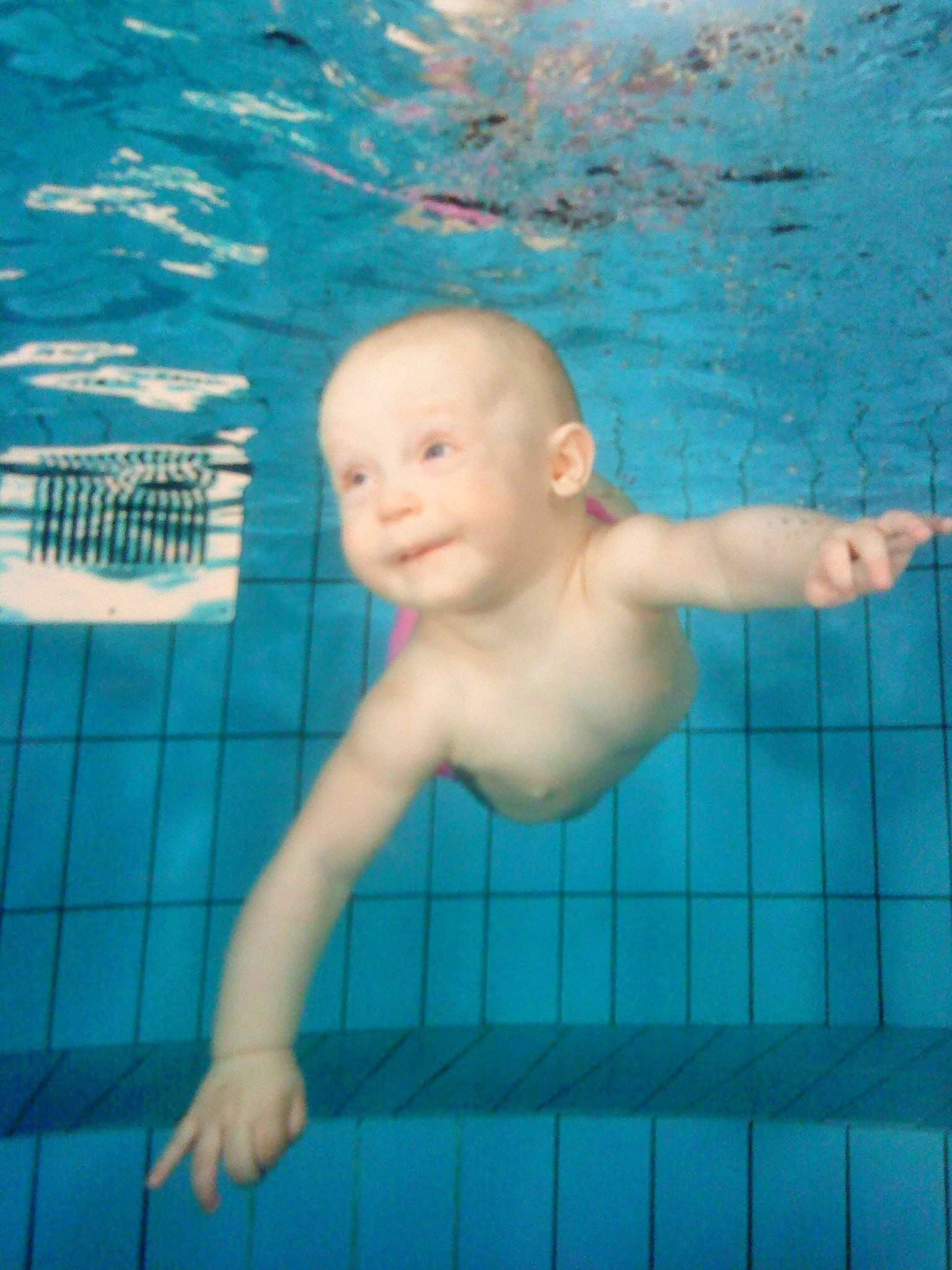 framåt i alla element här i vatten